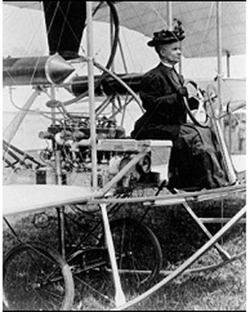 Лилиан Тодд